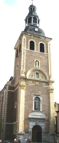 Virga-Jessebasiliek te Hasselt (België) - eigen foto